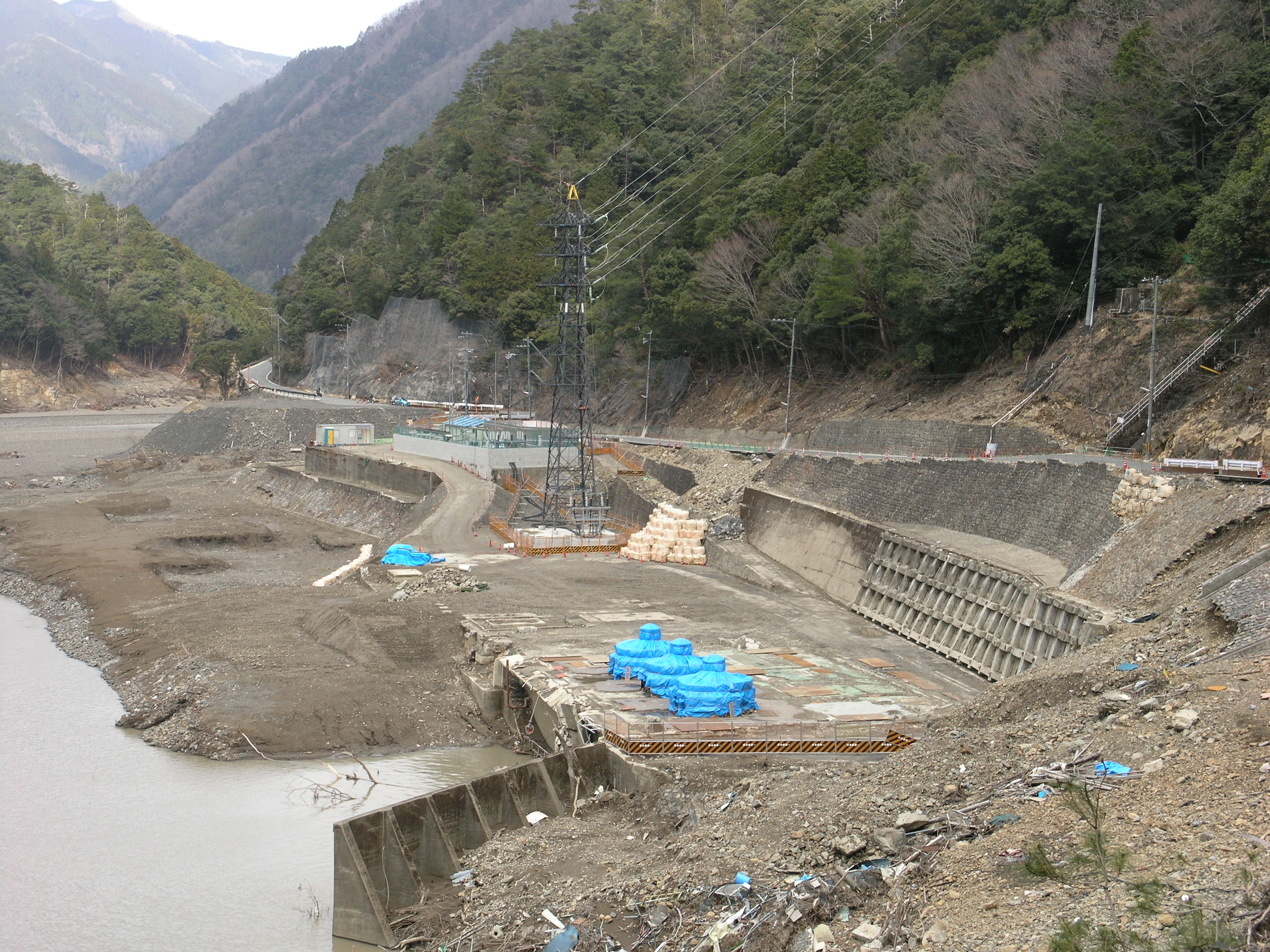 長殿発電所跡地 (奈良県十津川村長殿) Olympus C-8080WZ